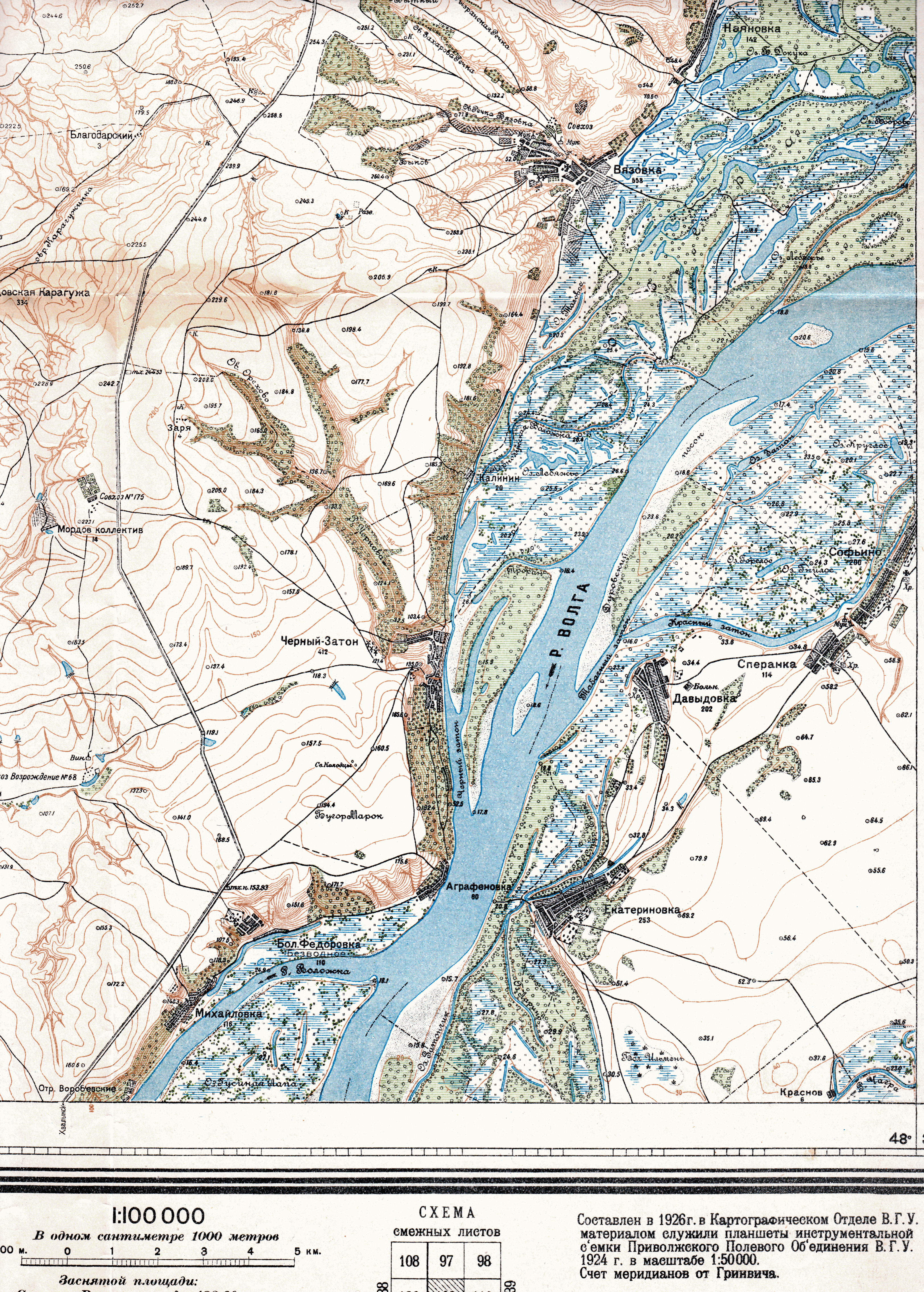 Радищевский район. Часть Карты № 39-109.